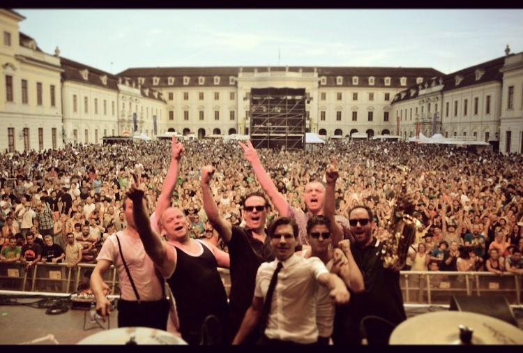 KSK-Music-Open-LaBrassBanda-2015